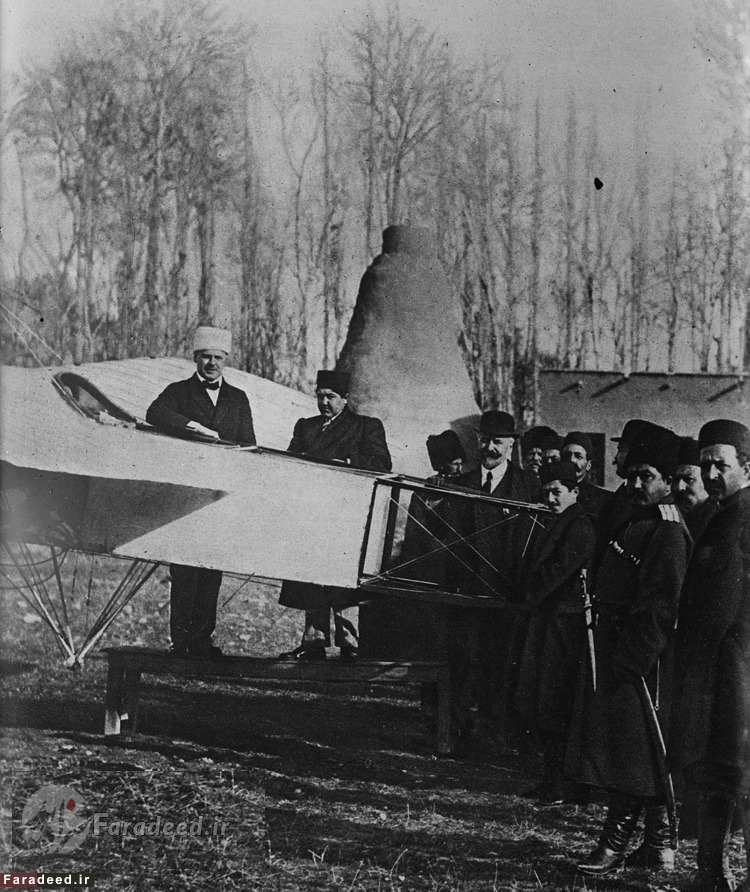 نگاره احمدشاه (میانه) و نخستین هواپیما در ایران-خلبان لهستانی «کوزمینسکی» (چپ) در تهران - 14 دی 1292